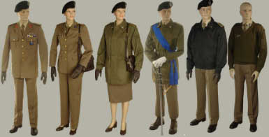 Uniformi di servizio dell'esercito italiano